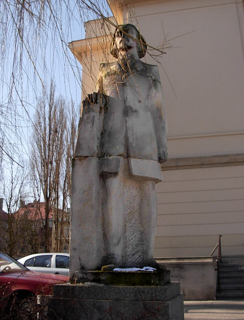 Galeria pomników kompozytorów i wirtuozów muzyki poważnej w Bydgoszczy - pomnik Henryka Wieniawskiego